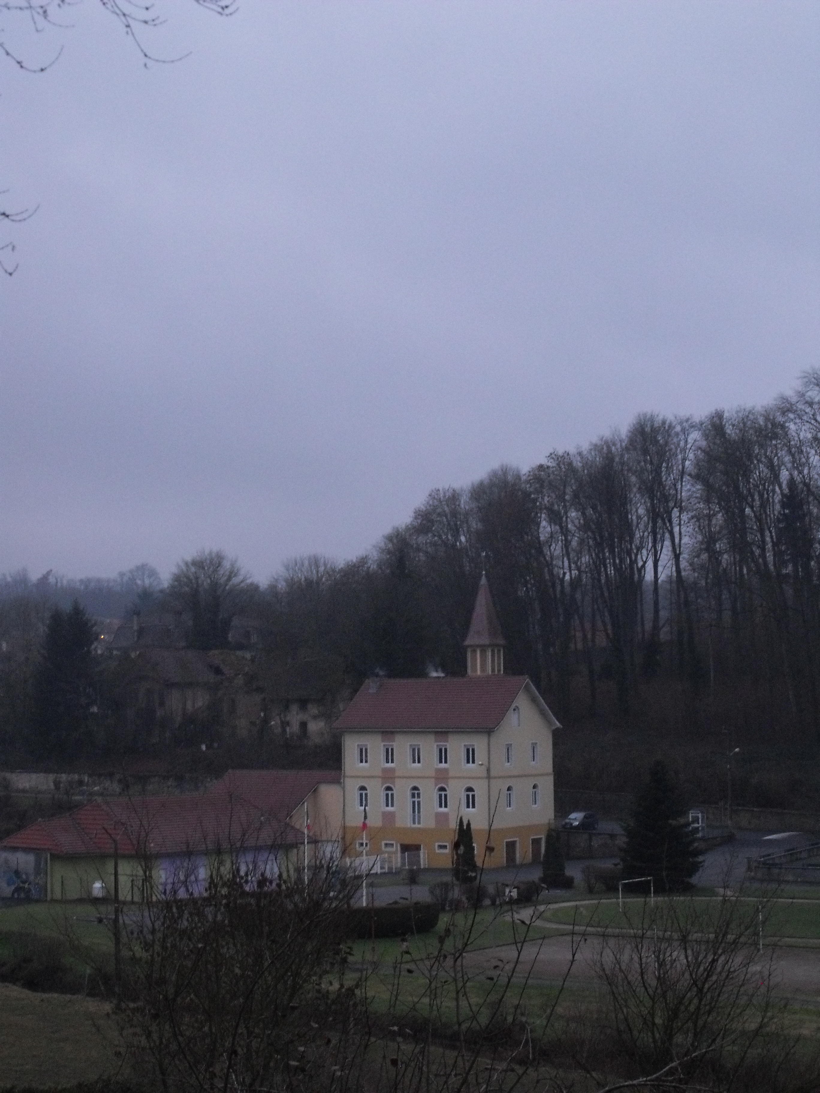 Mairie de Dung (Doubs, France)